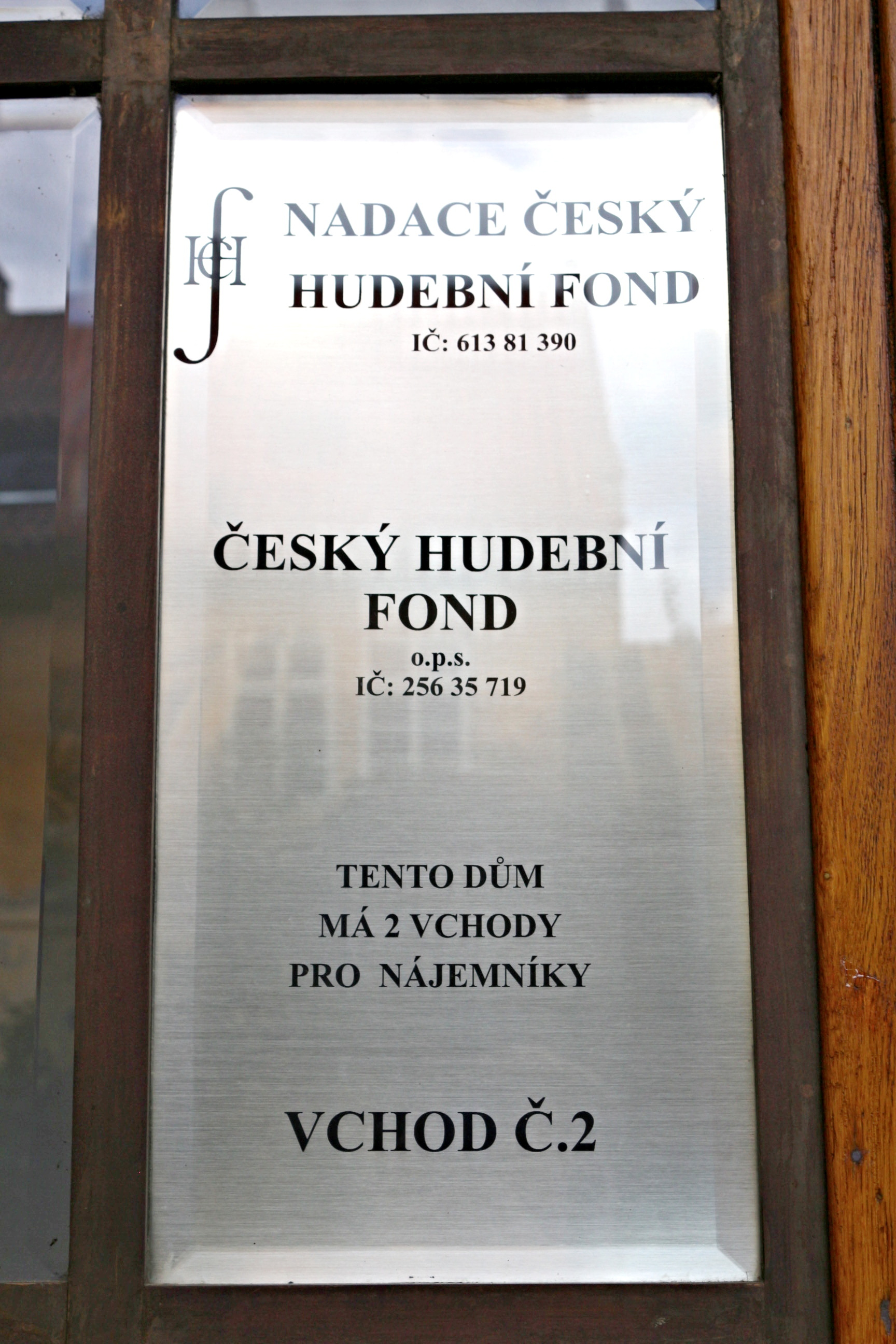 Divadlo Na Prádle